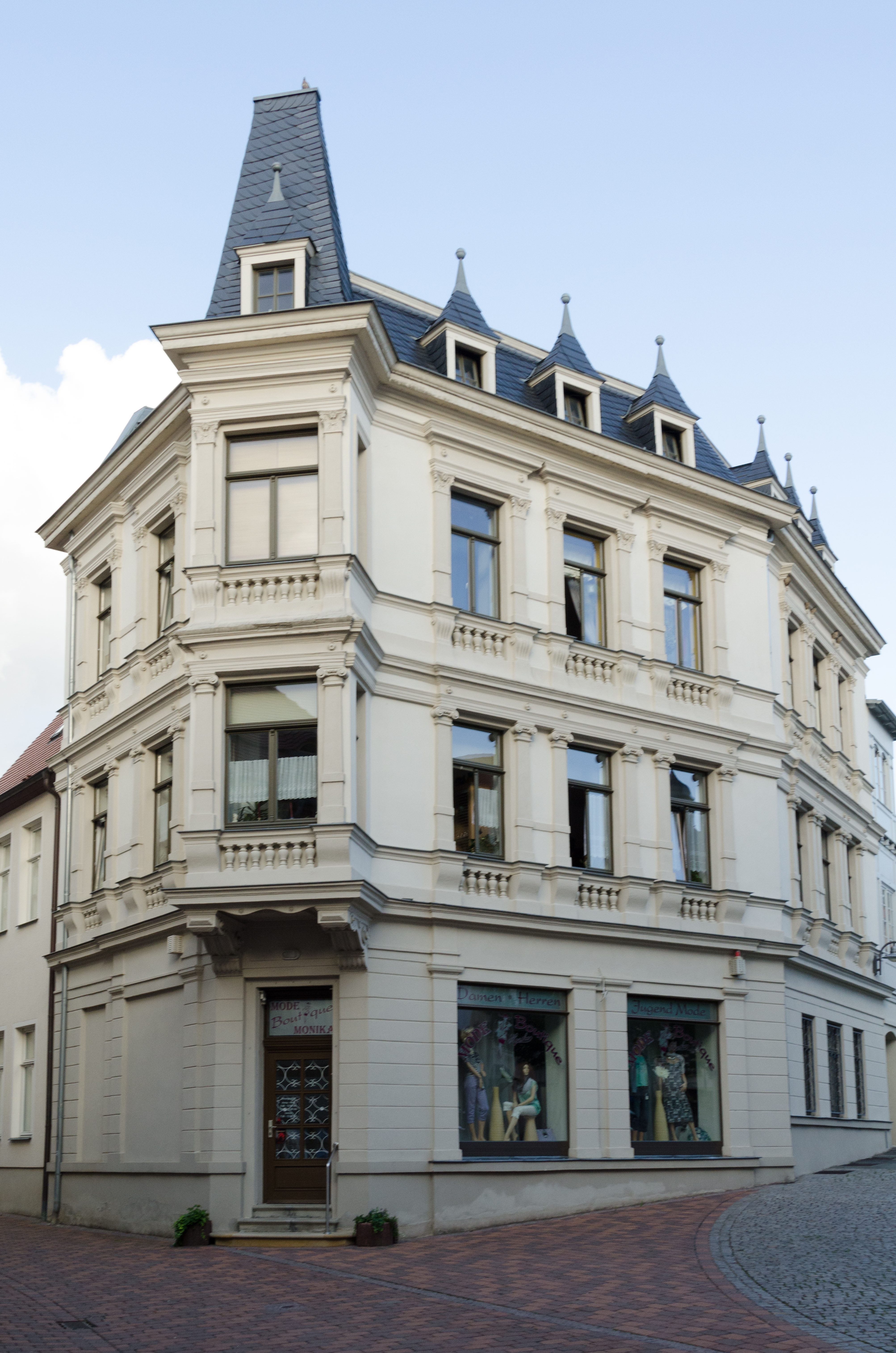 Querfurt, Graben 8